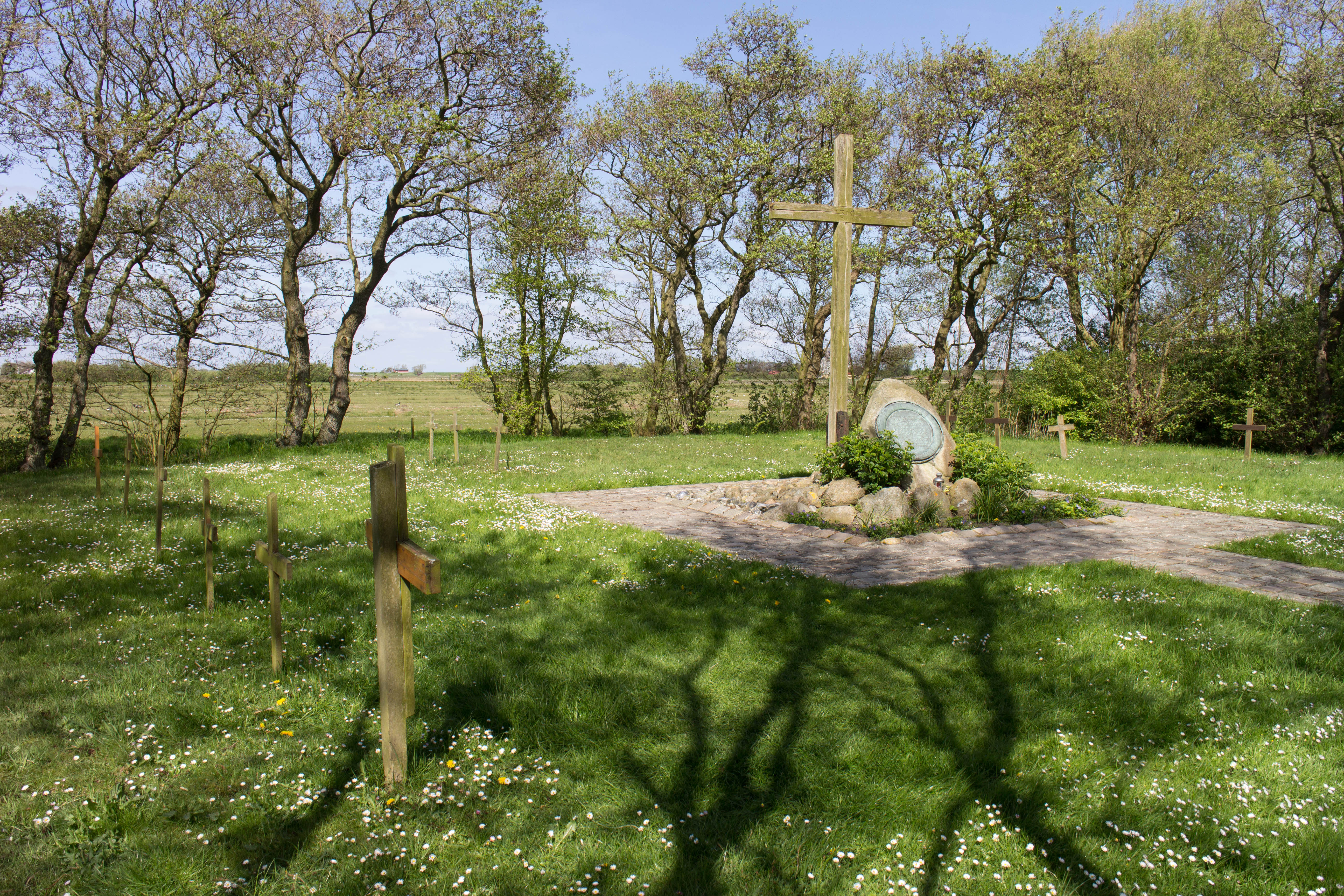 Friedhof der Namenlosen auf Neuwerk This is a photograph of an architectural monument.